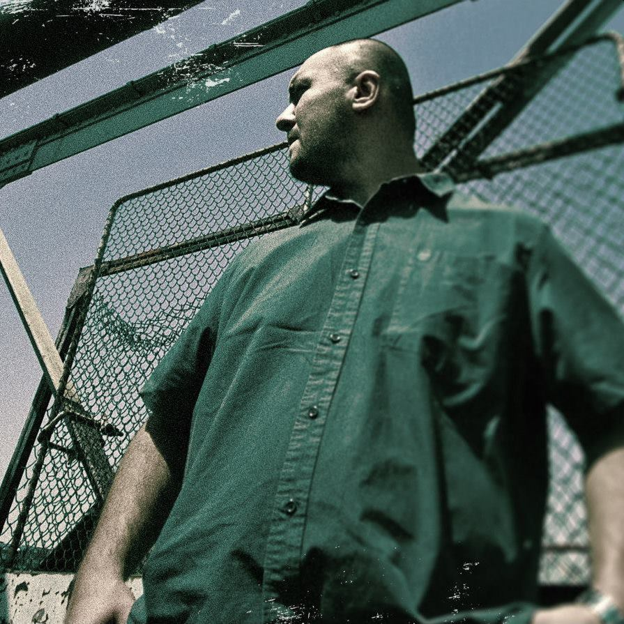 Interior coperta Ad Litteram -10